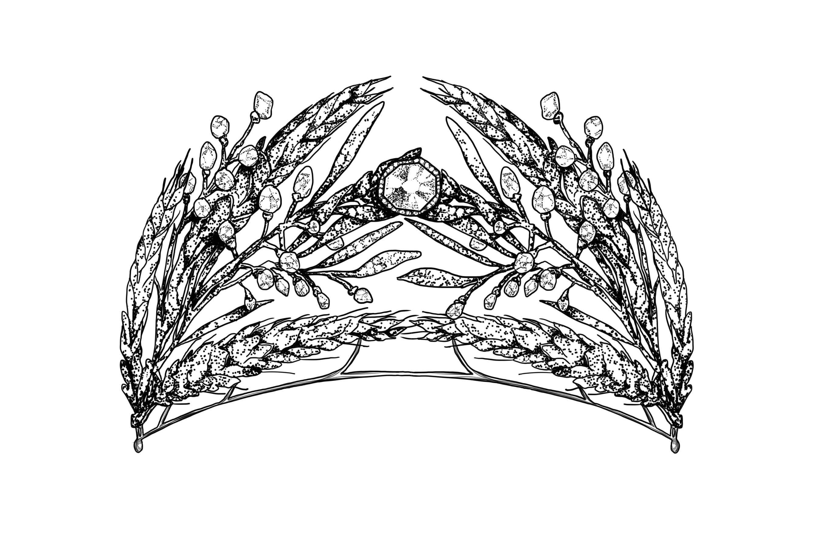 Бриллиантовая диадема, изготовленная в форме колосьев и лавровых листьев в стиле, характерном для первой трети XIX века. Была изготовлена для вдовствующей императрицы Марии Федоровны мастерской братьев Дюваль. В центре диадема украшена лейкосапфиром (бесцветный сапфир, похожий на бриллиант). После смерти Марии Федоровны, согласно ее завещанию, диадема была причислена к числу коронных драгоценностей.